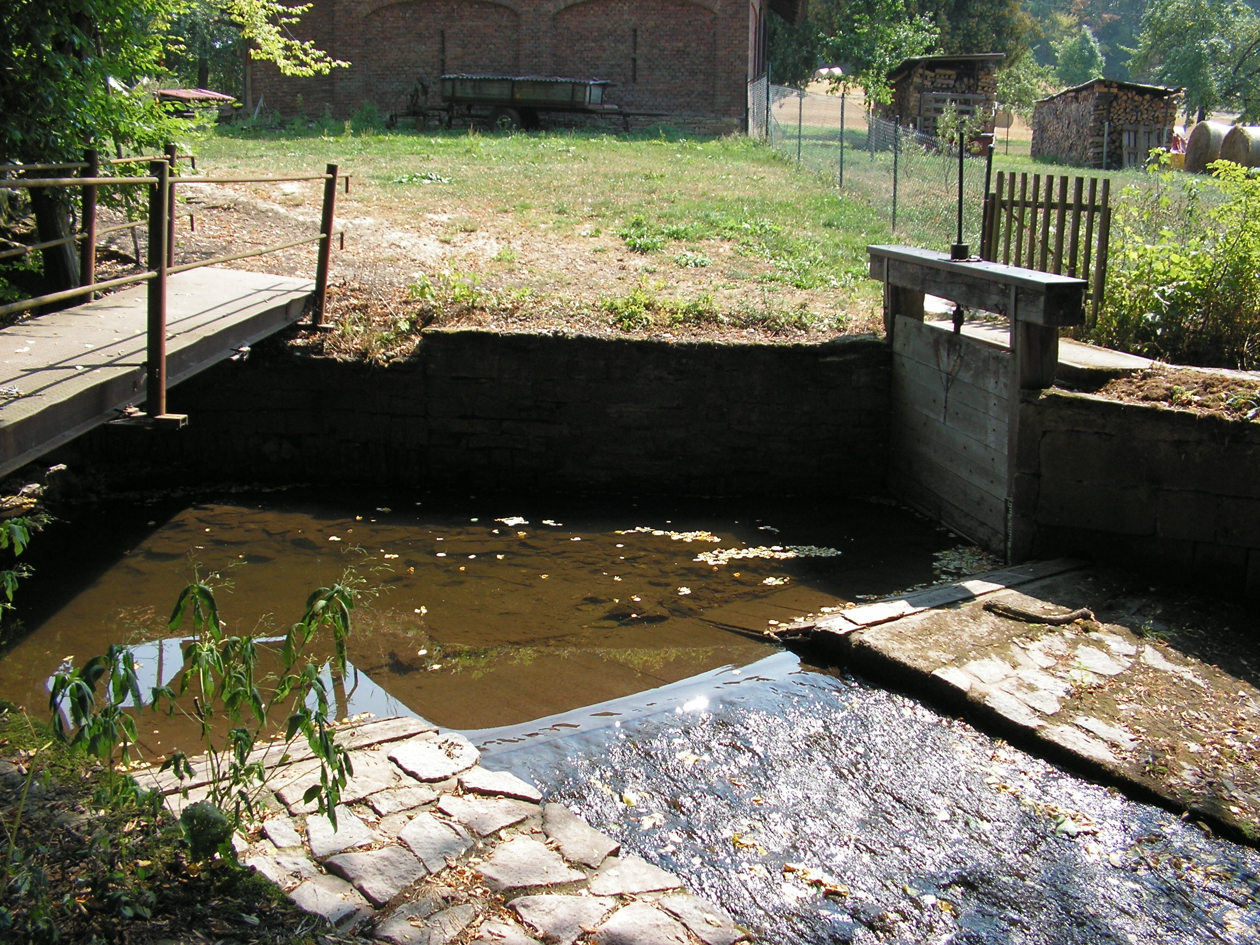 Rozdělovací objekt v Cháborech rozdělující vody Dědiny (Zlatého potoka) na severní a jižní větev. Severní větev tekoucí přes Dobrušku je v popředí snímku. Snímek byl pořízen za nízkého stavu vody.